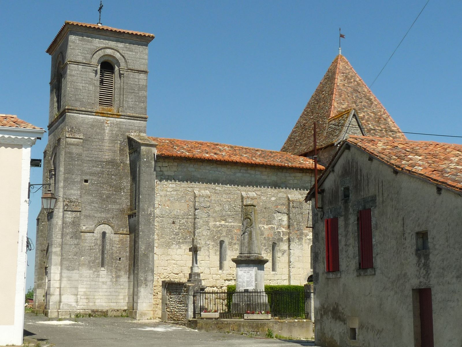 église des Essards, Charente, France